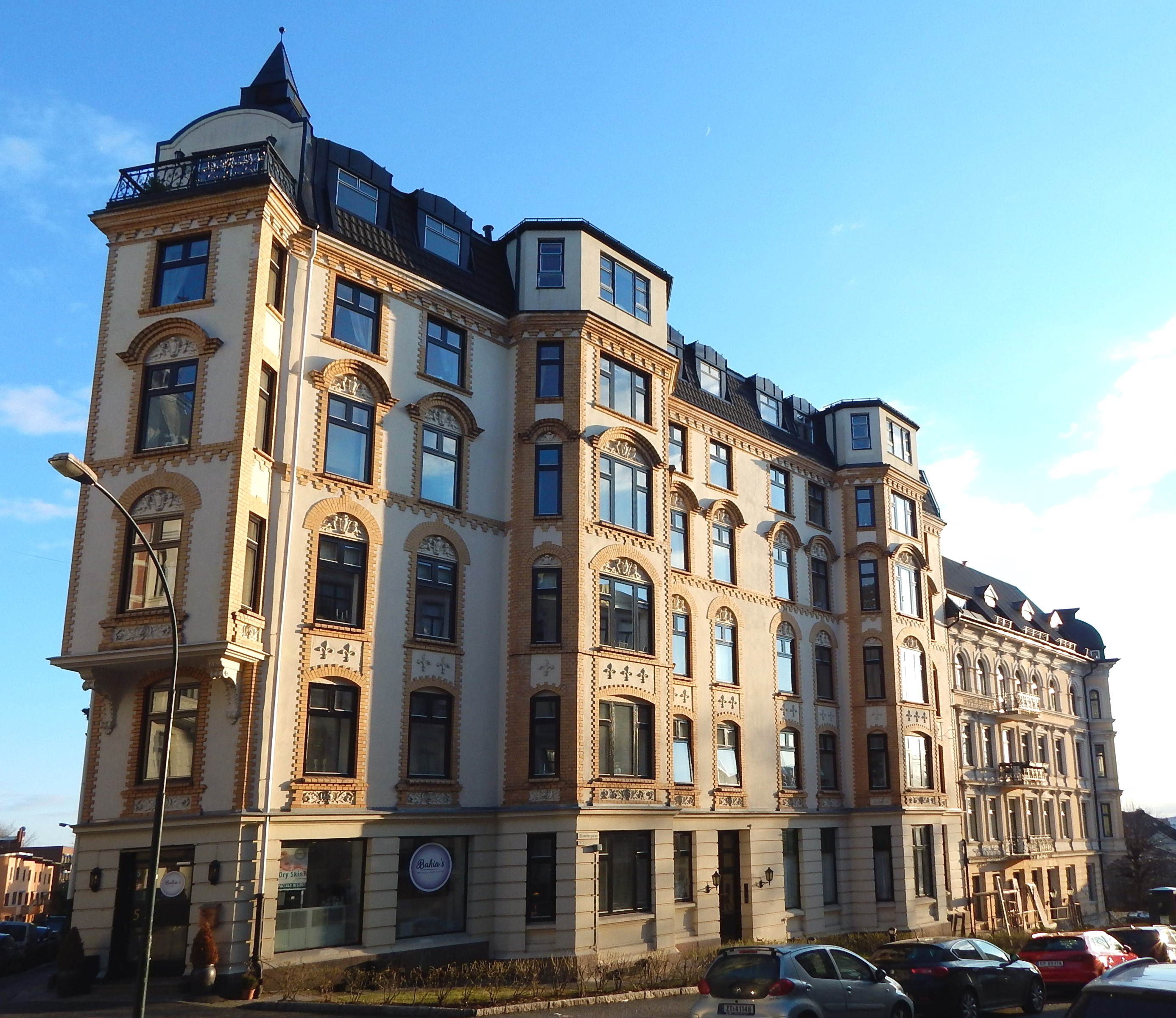 Elisenbergveien 5. Arkitekt: Alfred Køhn (1899).